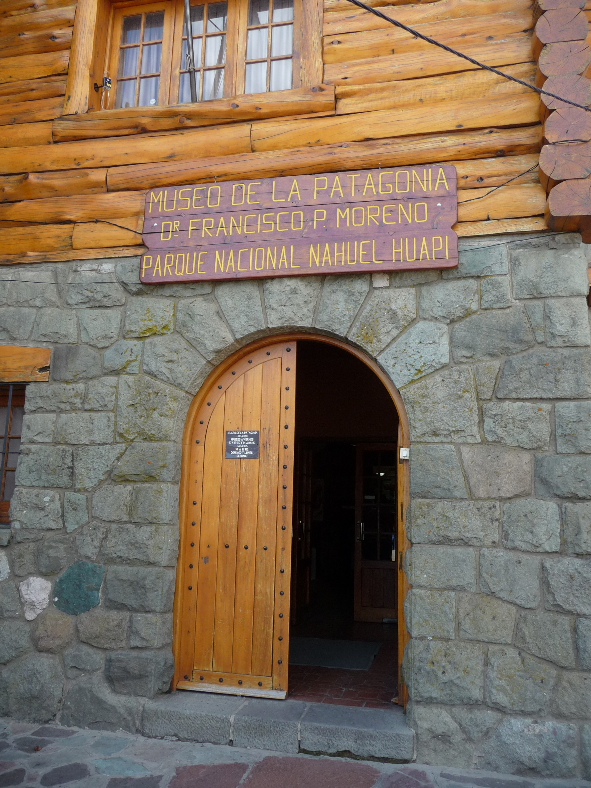 Puerta de entrada al museo